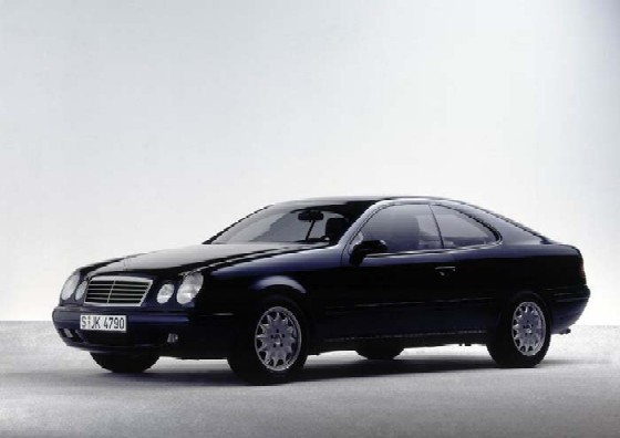 Bildbeschreibung: Coupé-Studie Quelle: Mediaseite der DaimlerChryslerAG Genehmigung: Gern können Sie für Ihre Tätigkeit für die Wikipedia Inhalte der DaimlerChrysler Medienseiten verwenden. Dazu erkennen wir die Bedingungen nach GNU-FDL an. Das Angebot bezieht sich auch auf die vorhandenen Bilder.(Dr.Josef Ernst, Communications, DaimlerChrysler AG)